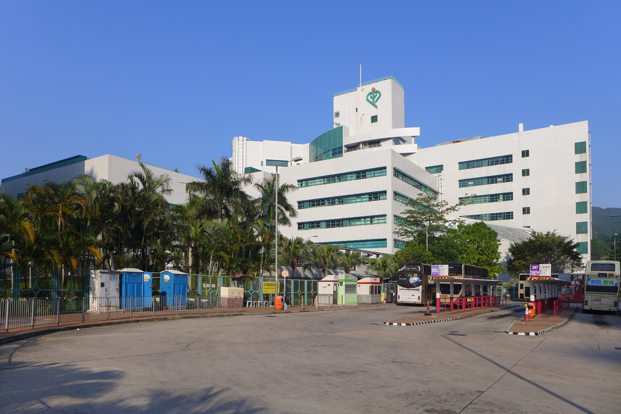 Tseung Kwan O Hospital